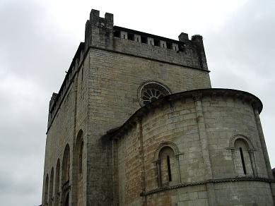 Igrexa de San Nicolás, en Portomarín. Vista dende a parte traseira, tendo visibles as almeas. Tomada o 09/07/05 por user:Agremon Uploaded by User:Agremon